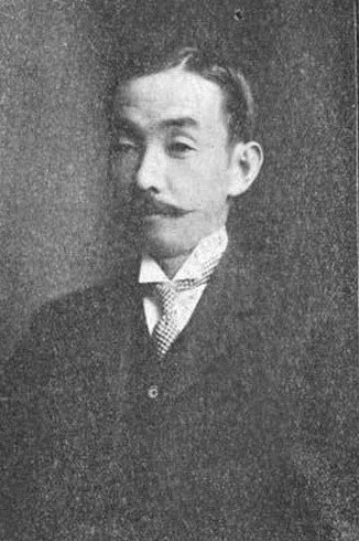 武智直道 1900年代